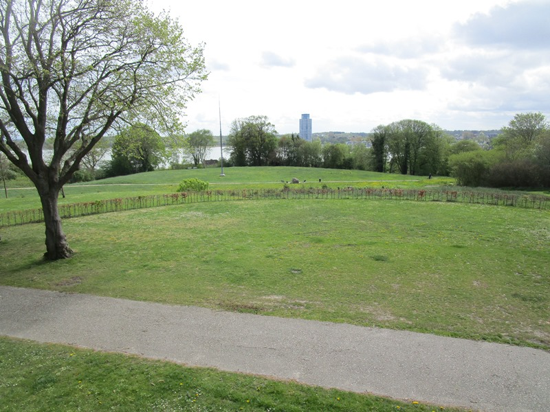 Hestebjerg i Slesvig by